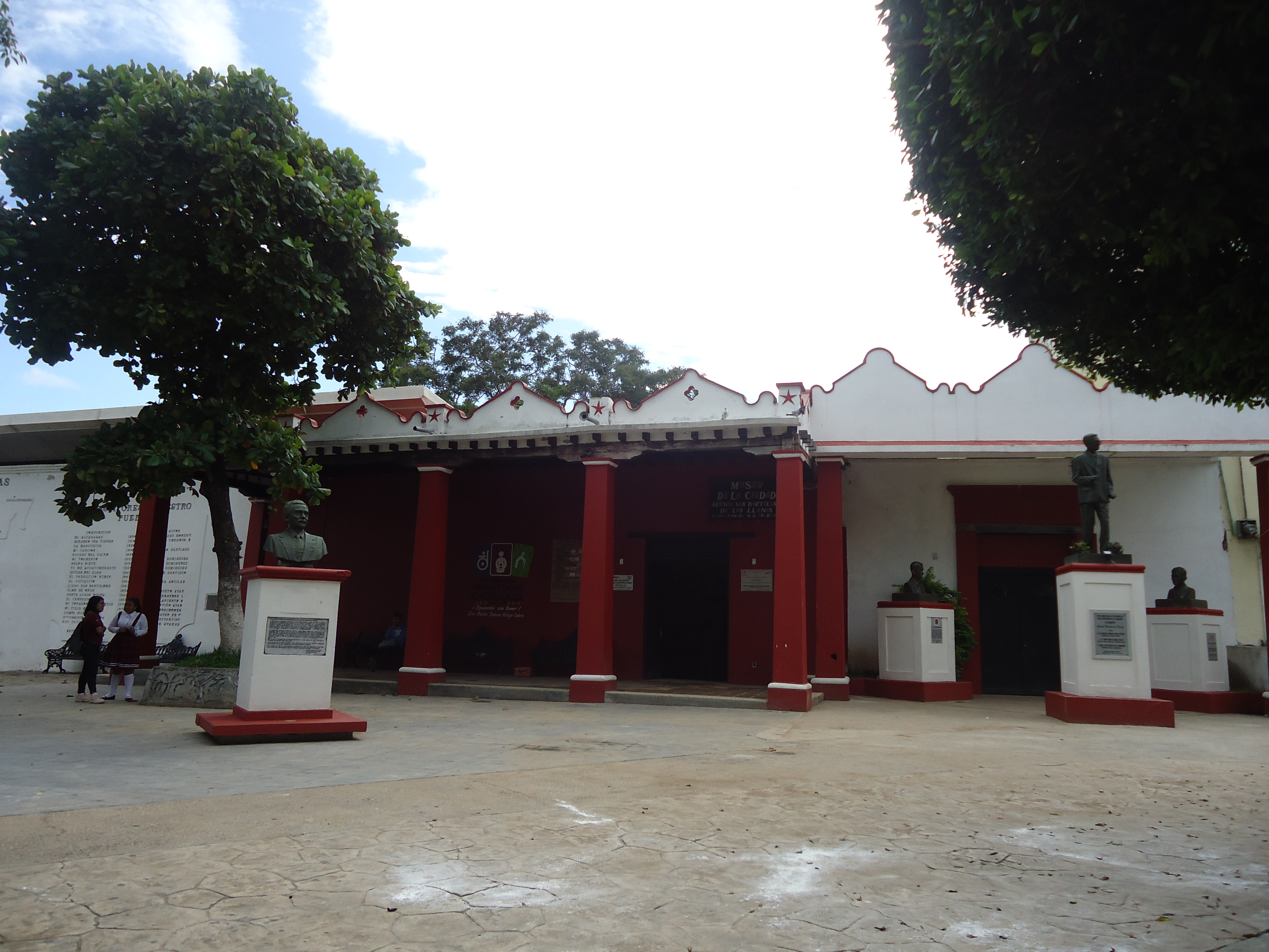 Nueva casa de la cultura en Venustiano Carranza Chipas